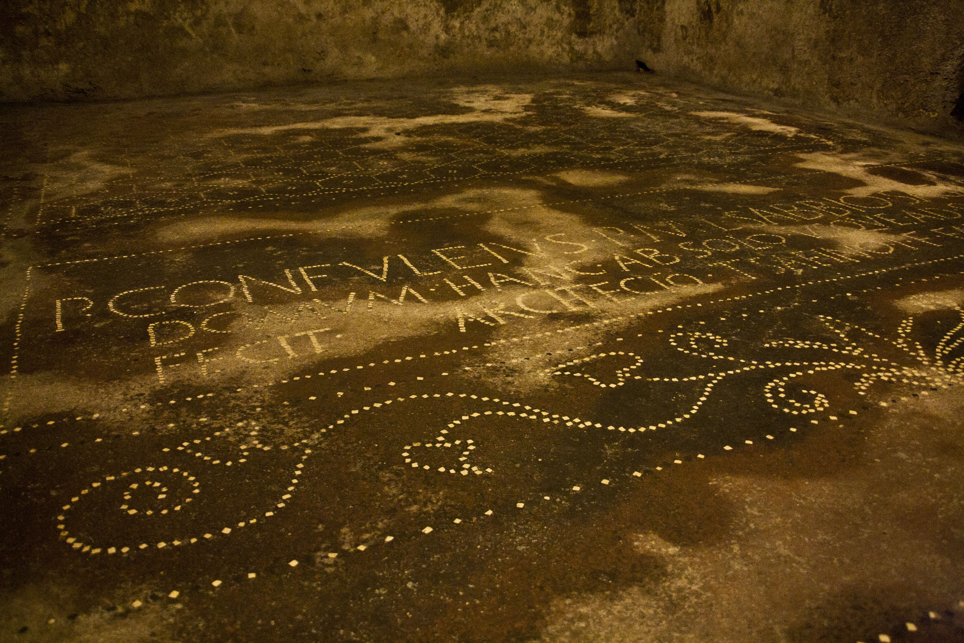 Domus Confuleius - MIBAC This is a photo of a monument which is part of cultural heritage of Italy.